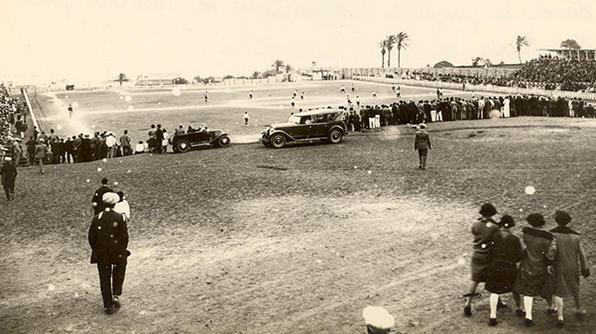 Vista del Stadium, nombre con el que era conocido el Estadio Heliodoro Rodríguez López de Santa Cruz de Tenerife. Se enfrentaban los equipos locales Iberia y Salamanca en un partido correspondiente a la Copa Coca Cola, disputada en el verano de 1928.